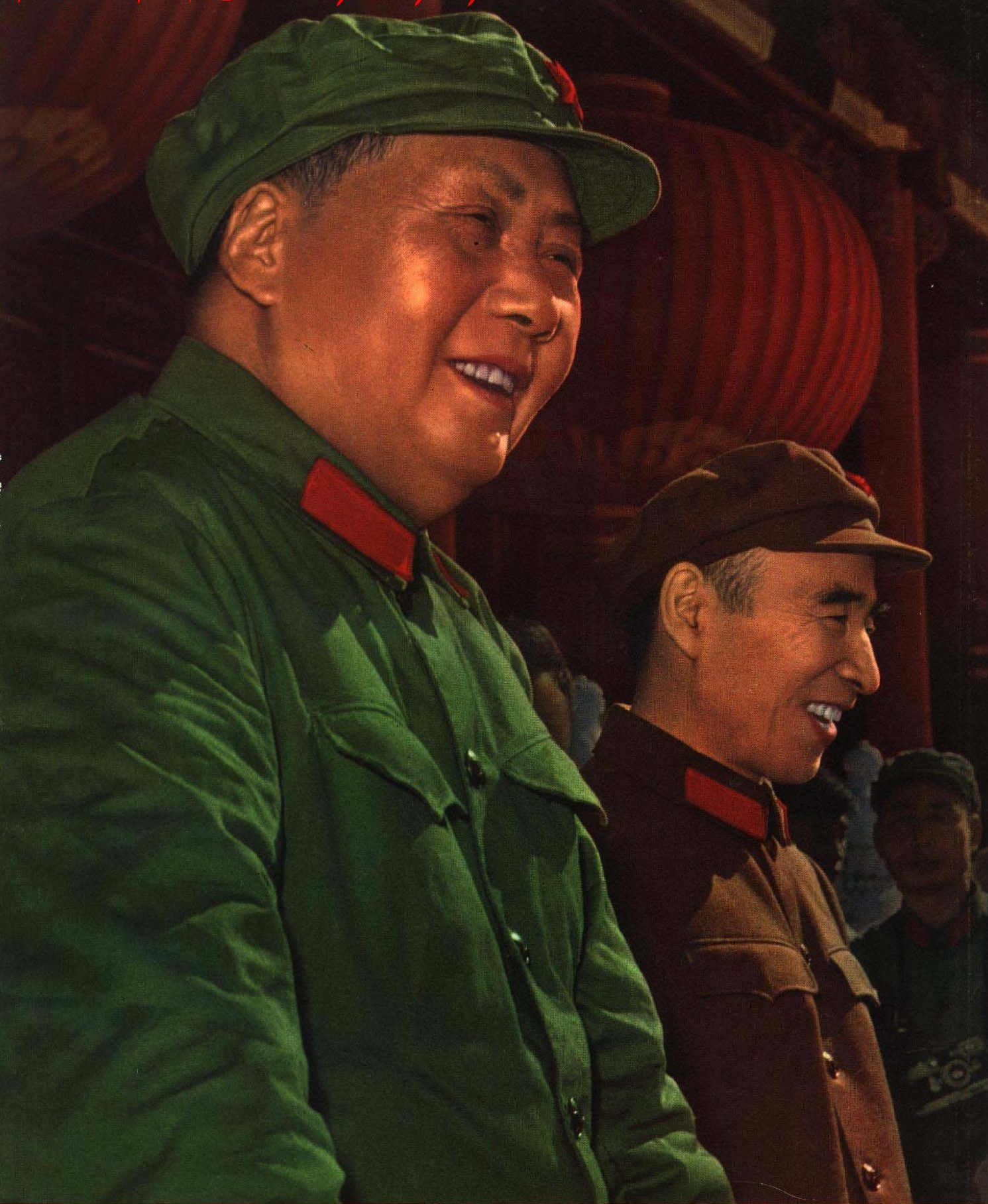 1967-07 1967年毛泽东和林彪